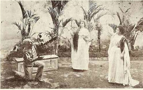 Apresentação alegórica no Teatro Lucinda, no Rio de Janeiro, comemorando a abolição da escravatura no Brasil